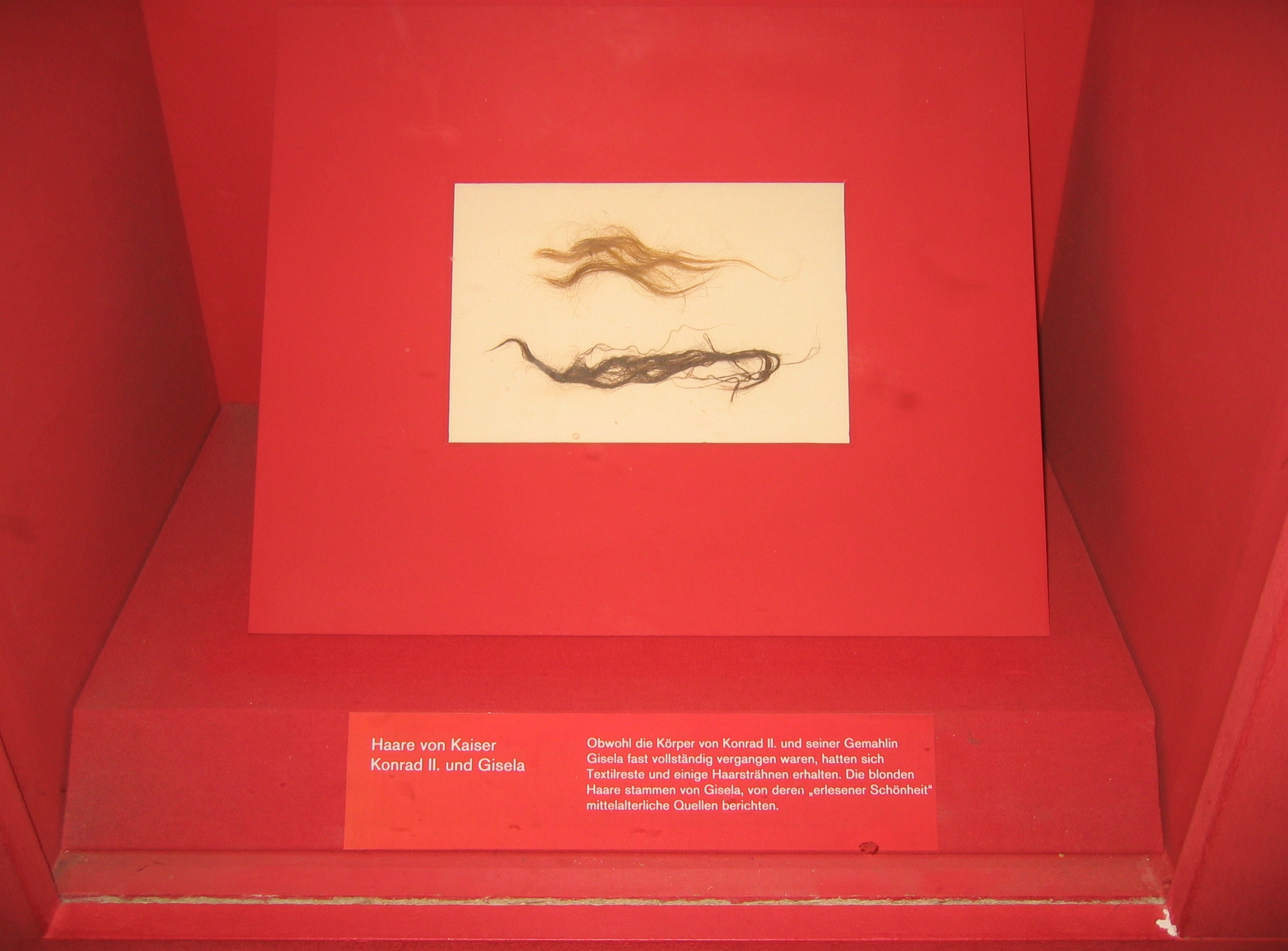 Haare von Kaiser Konrad II und Gisela aus der Domschatzkammer des Dom zu Speyer (Historisches Museum der Pfalz Speyer), wo auch Konrads und Giselas Grabstätten liegen. Obwohl zum Zeitpunkt der Graböffnung die Körper von Konrad II und seiner Gemahlin Gisela fast vollständig verwest waren, hatten sich Textilreste und einige Haarsträhnen erhalten. Die blonden Haare stammen von Gisela, von derern "erlesener Schönheit" mittelalterliche Quellen berichten.